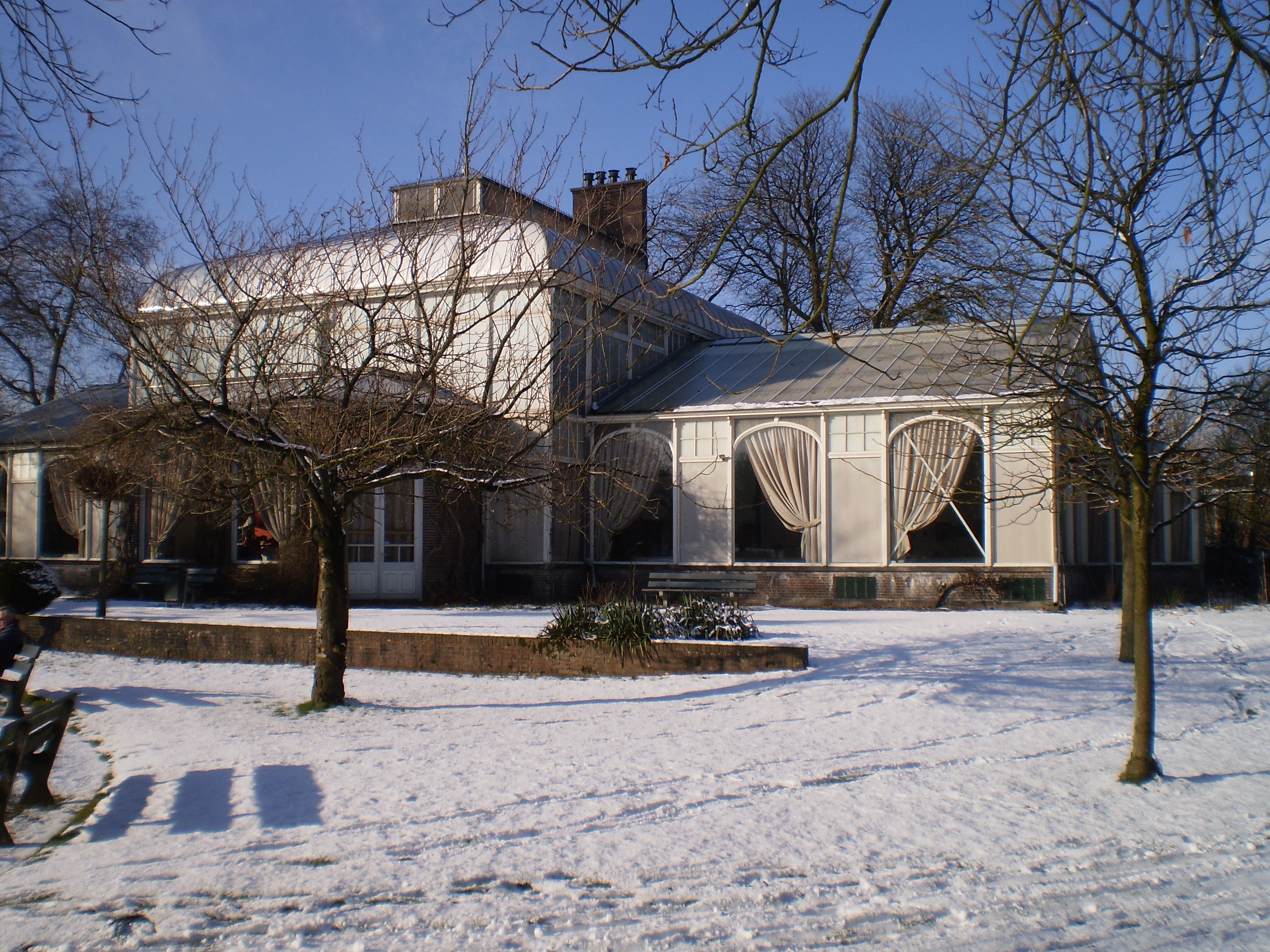 súdeastside